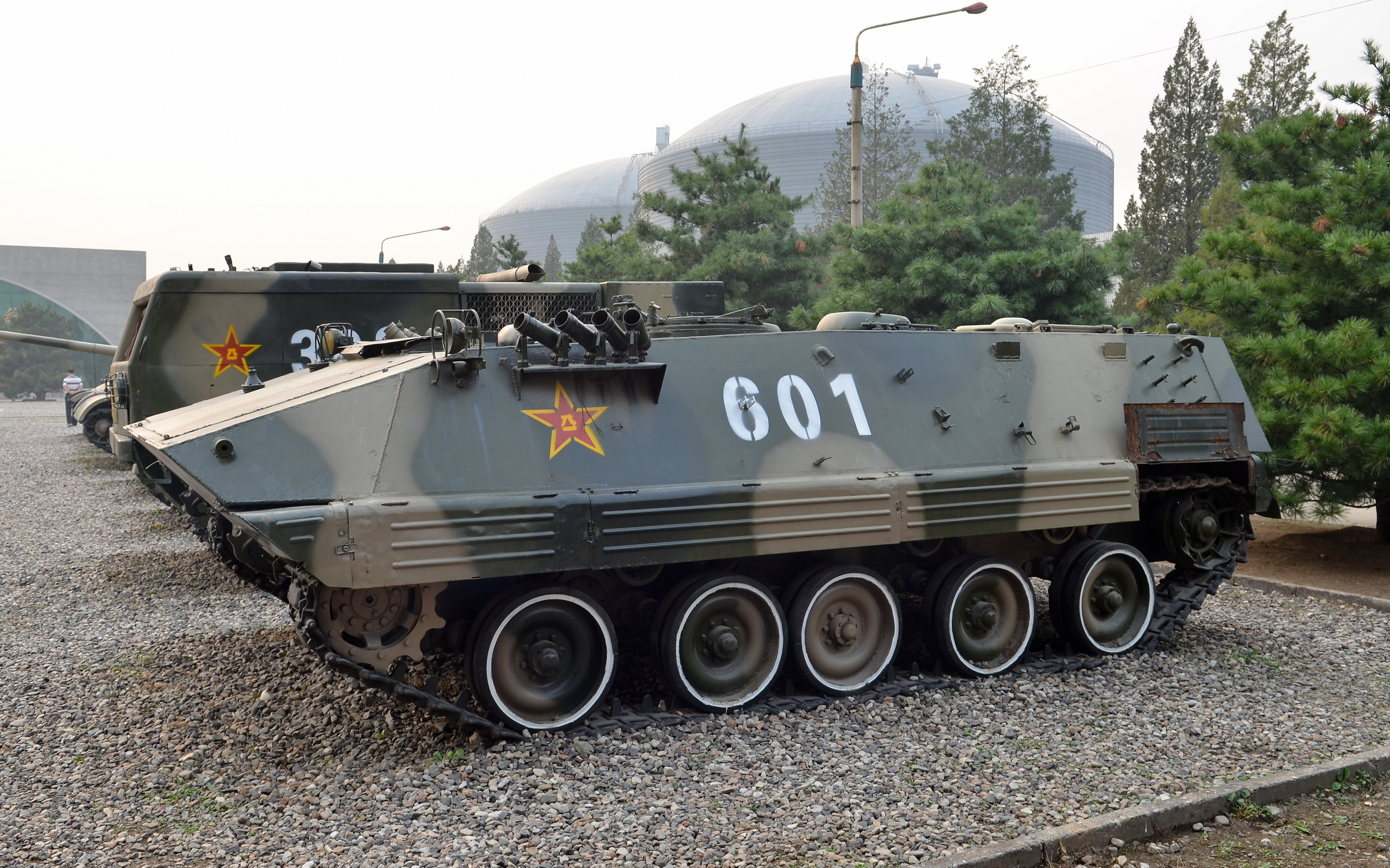 85式履带装甲输送车, 保存在北京昌平的坦克博物馆.